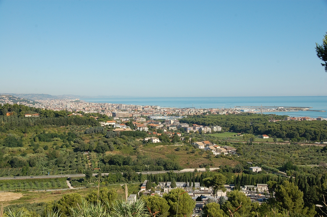 Pescara